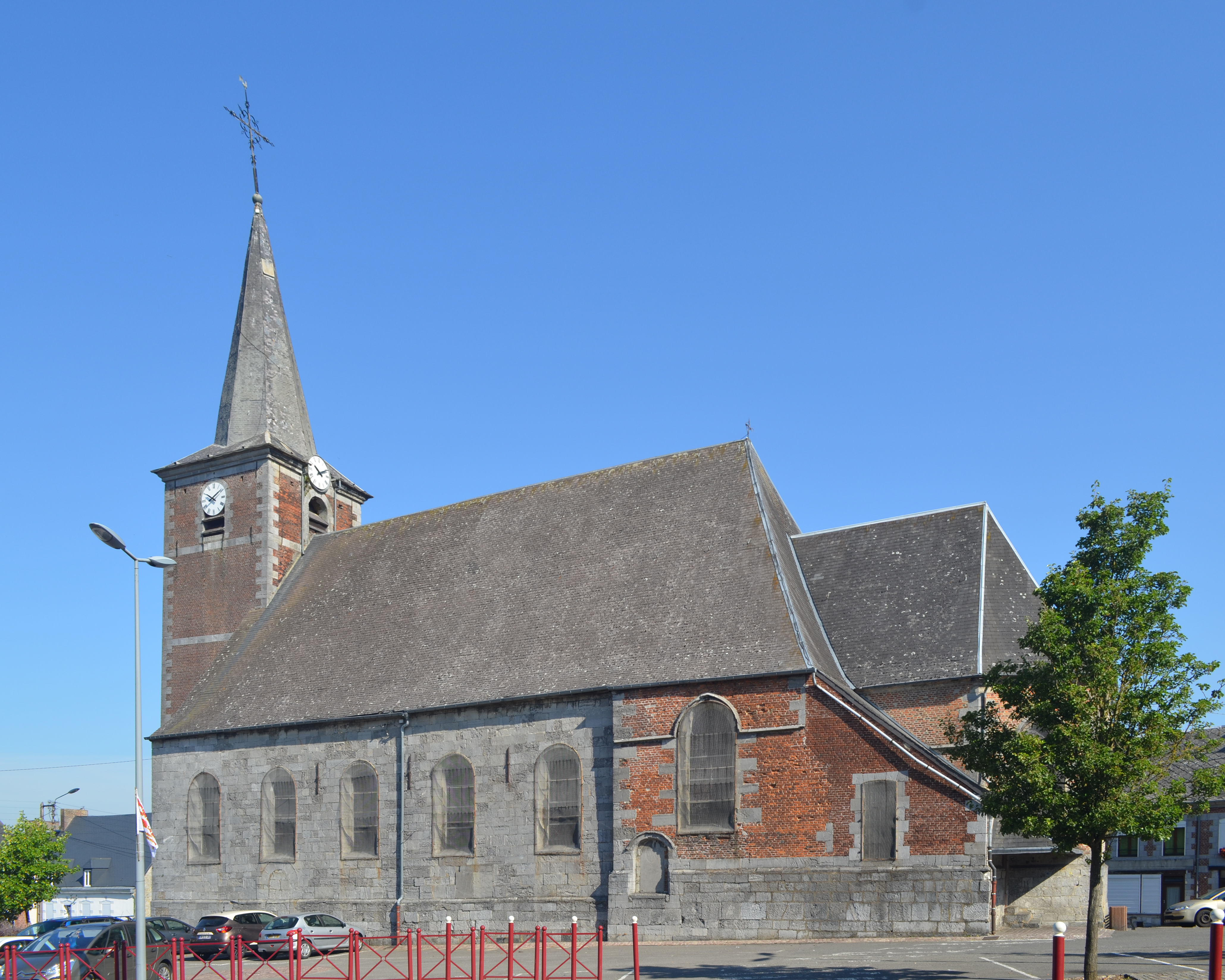 Trélon (Nord-France) - Église Saint-Léger.